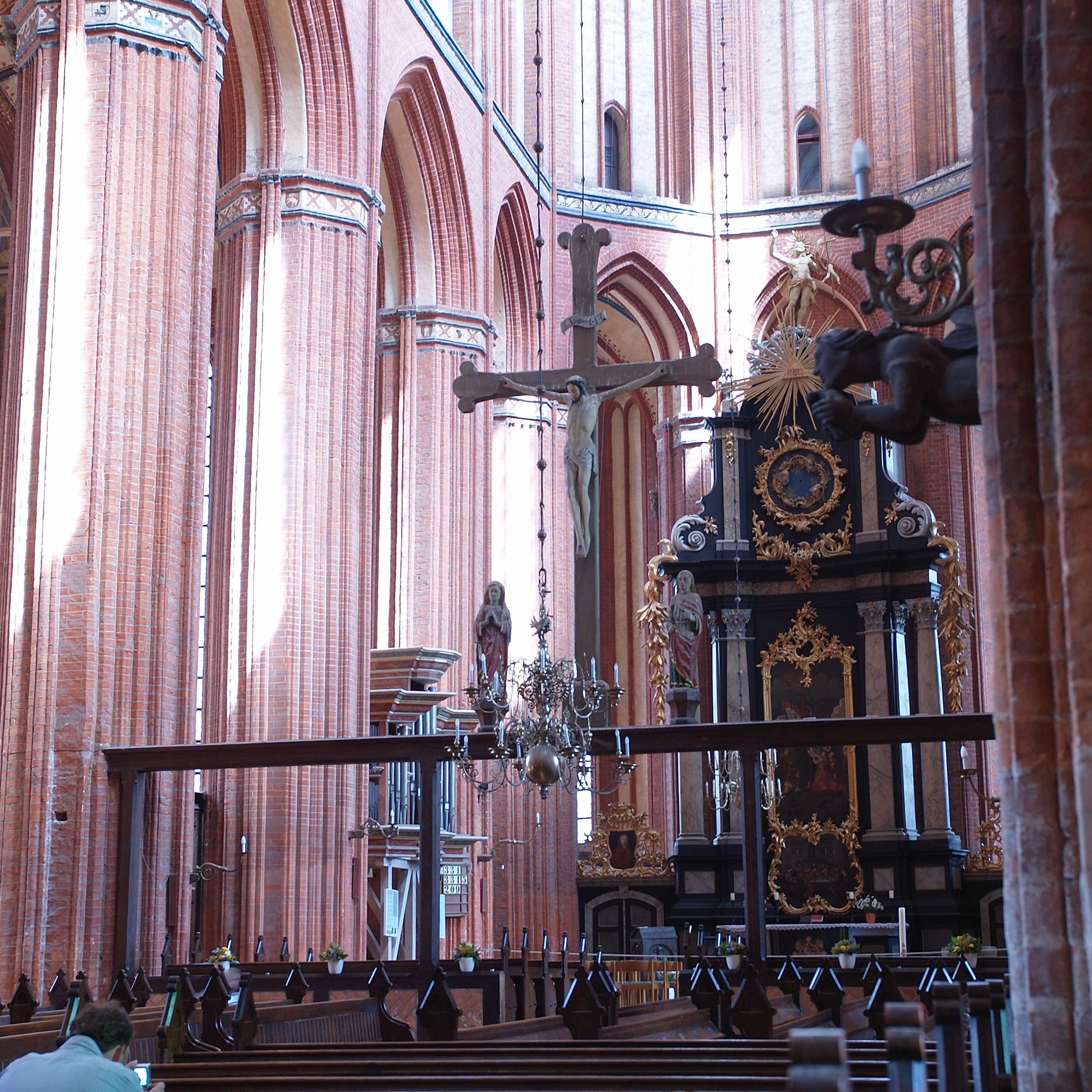 St. Nikolai in Wismar, Triumpfkreuz und barocker Altar